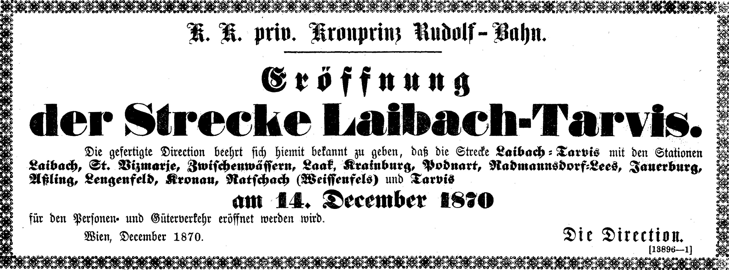 Ankündigung der Eröffnung der Eisenbahnstrecke Tarvis–Laibach für den 14. Dezember 1870